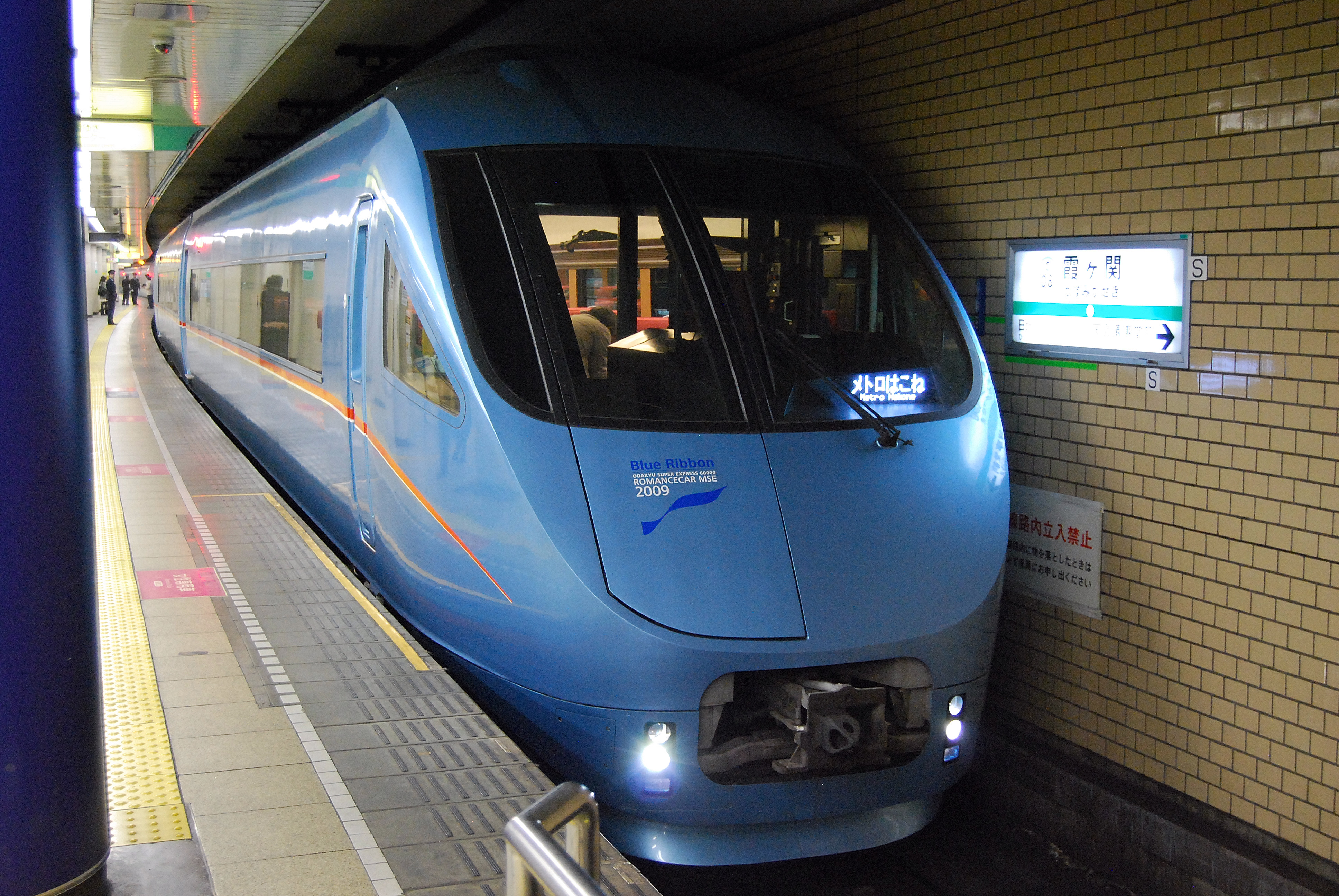 東京メトロ千代田線霞ヶ関駅に停車する小田急60000形ロマンスカー